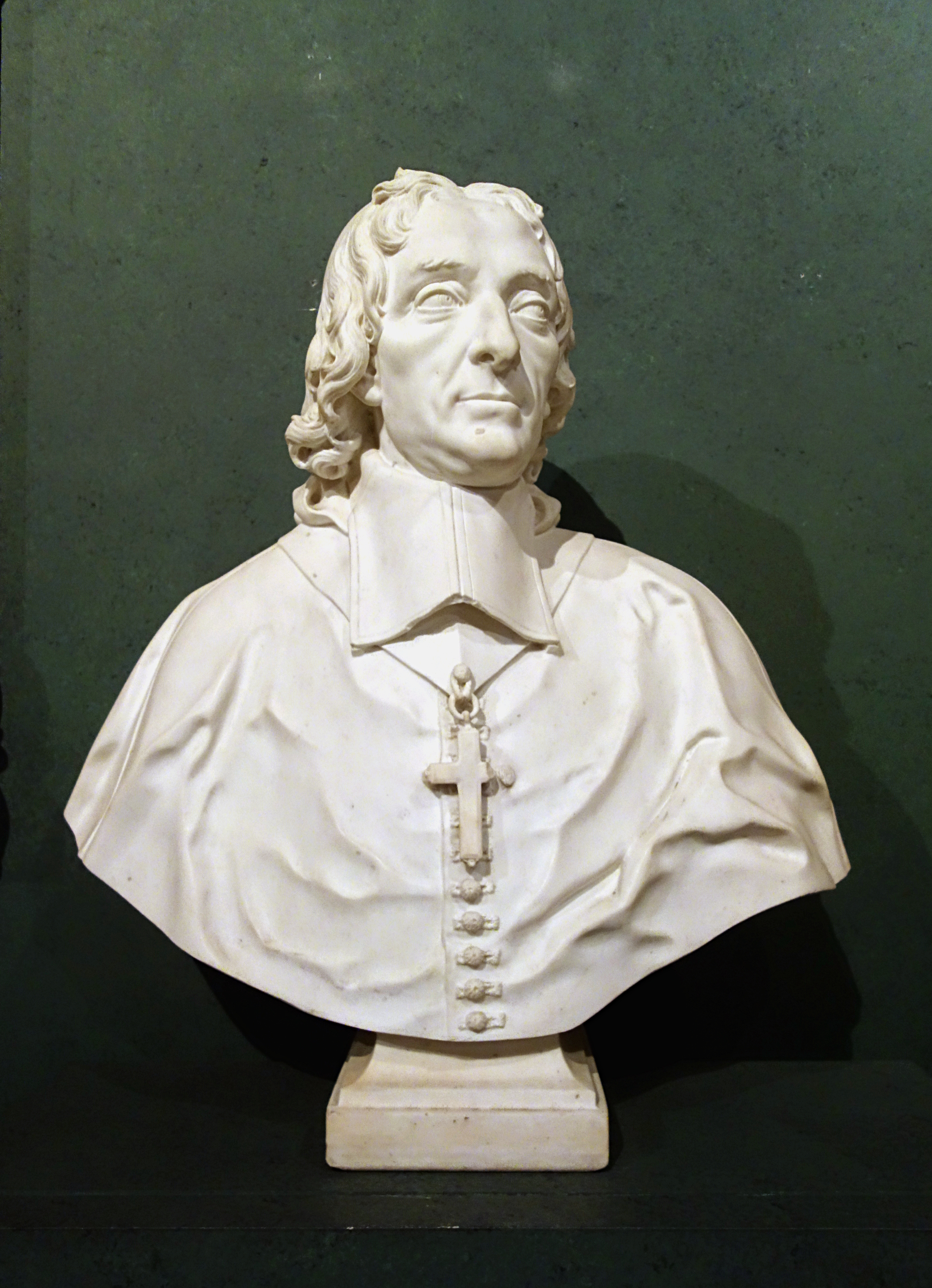 Portrait en buste de Monseigneur François de la Mothe Fénelon, marbre par Jean-Louis Lemoyne au musée de Cambrai.